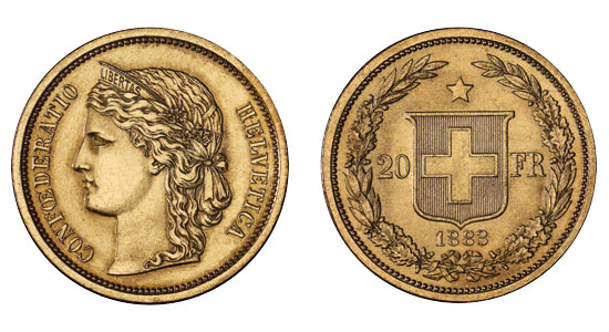 20 Fr 1883 en Or, image originale de SwissMint